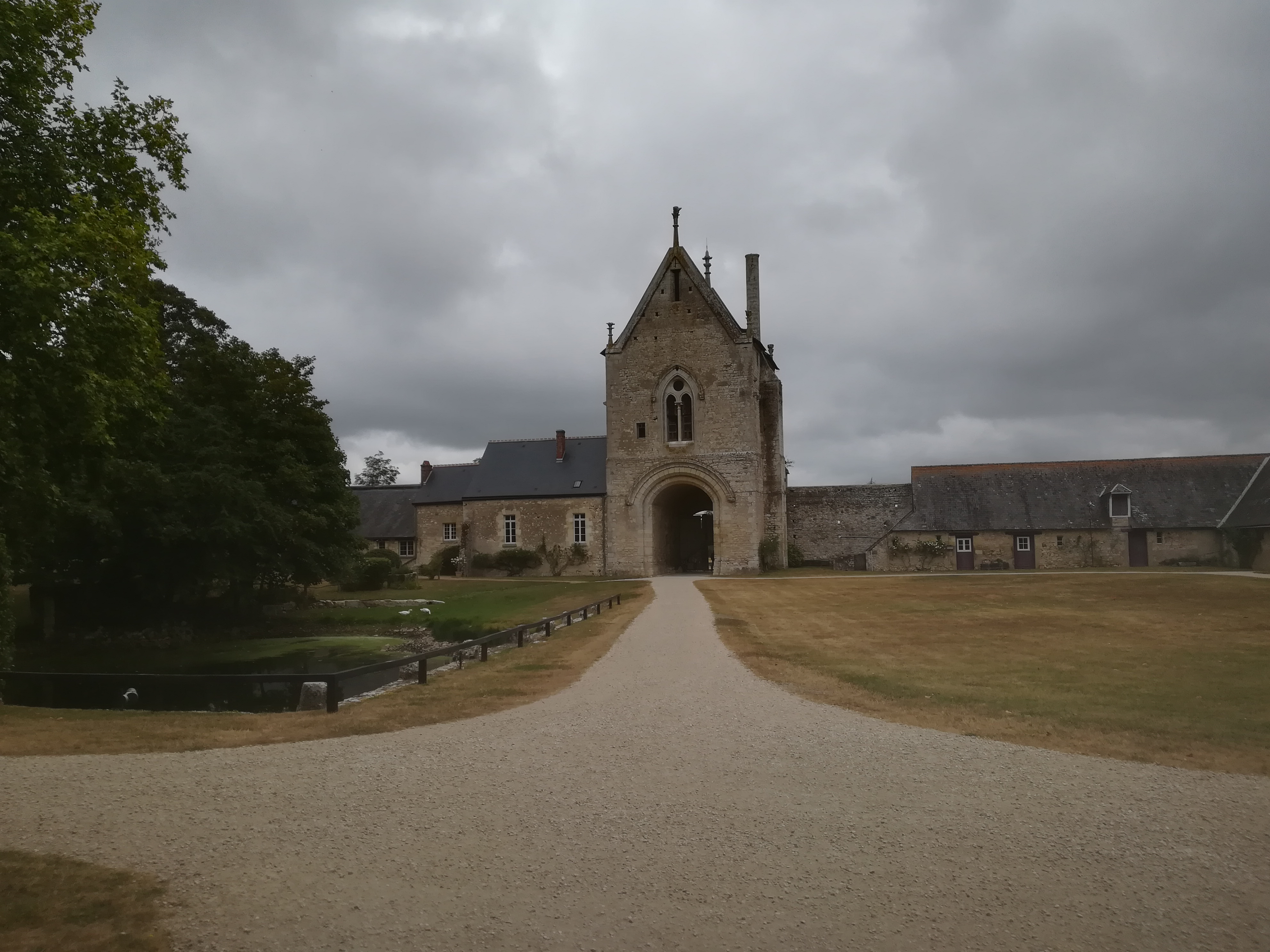 Vue de la cour intérieure de la ferme fortifiée de Meslay, depuis l'entrée de la grange ; on peut notamment voir le portail d'entrée et les bâtiments attenants, ainsi que l'allée de graviers menant à la grange.